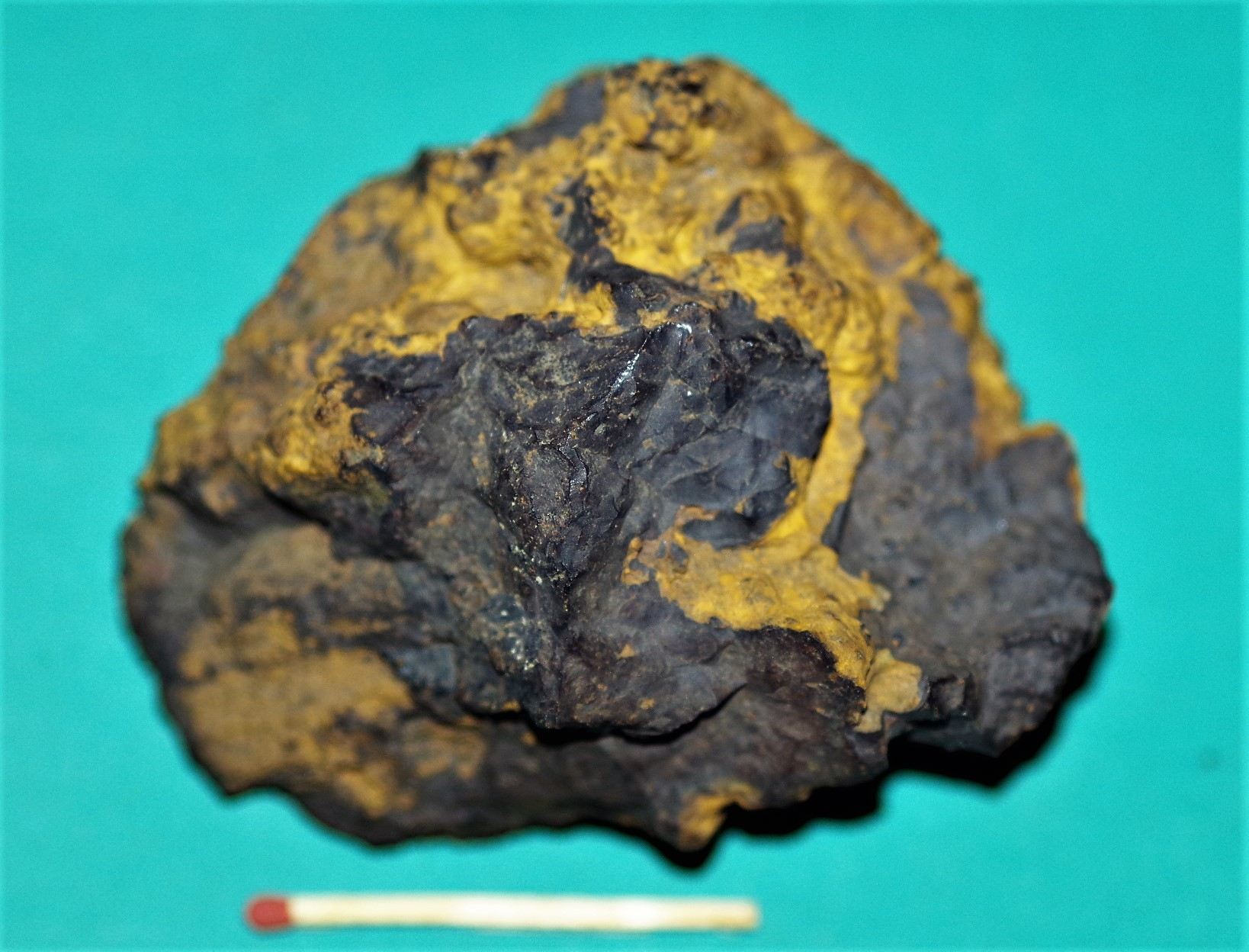 Brauneiesenerzknolle / Limonit aus dem oberen Braunjura; Erzkessel Küßnach, Klettgau